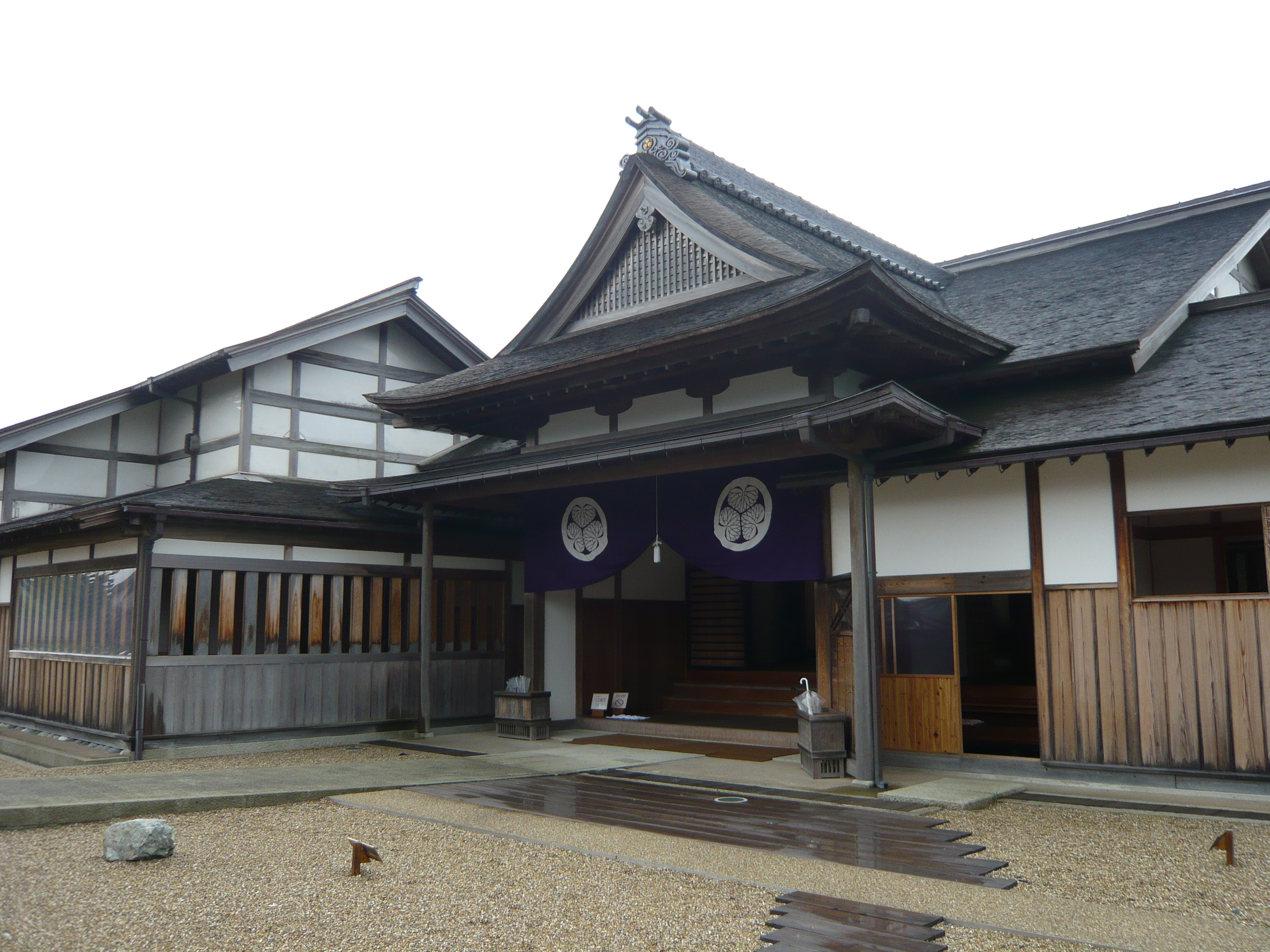 佐渡市相川町、佐渡奉行所。